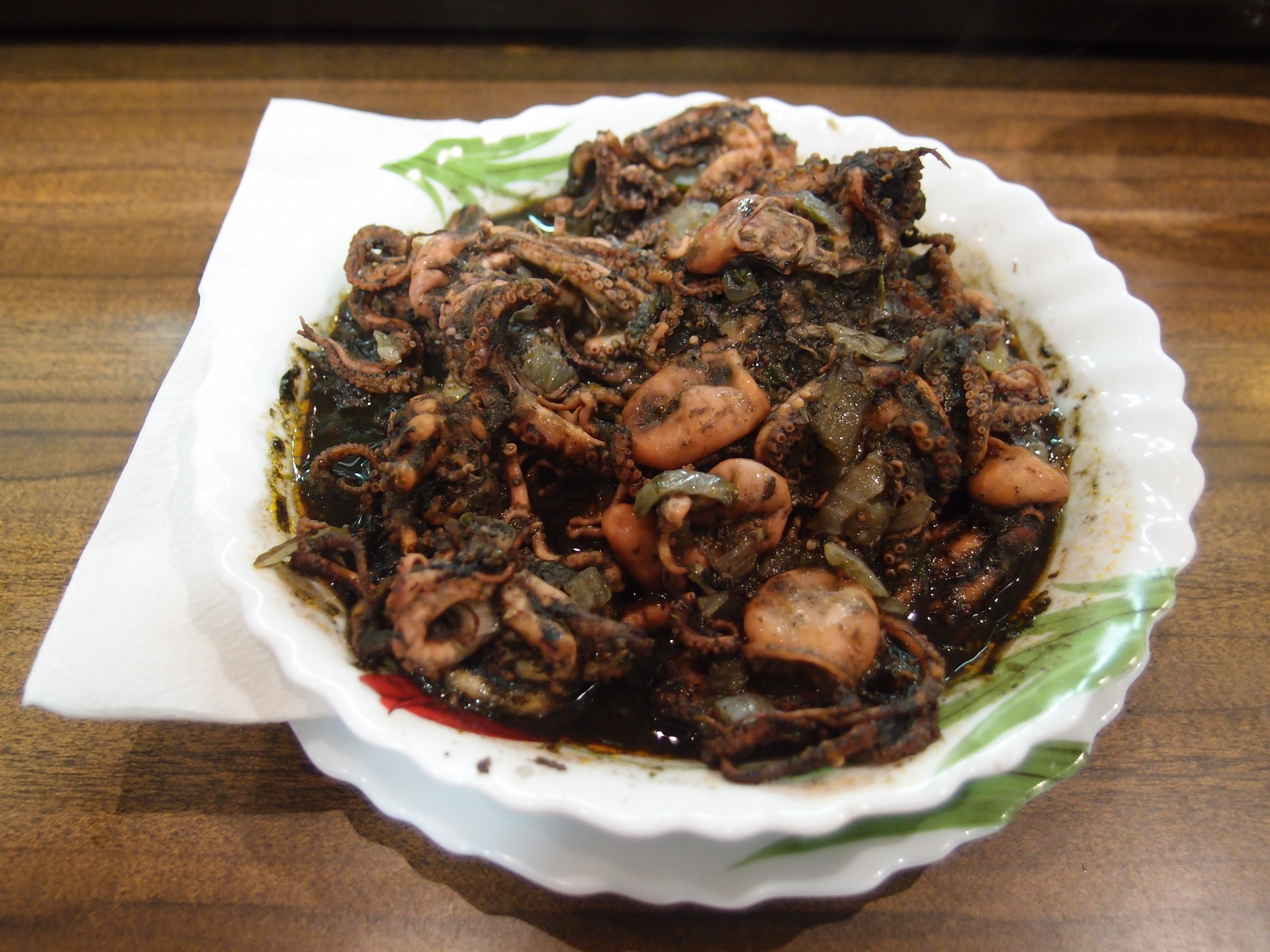 Pulpitos in eigener Tinte Datum: 05.09.2014 Urheber: M. Pfeiffer alias Gordito1869 Quelle: privates Fotoarchiv des Urhebers